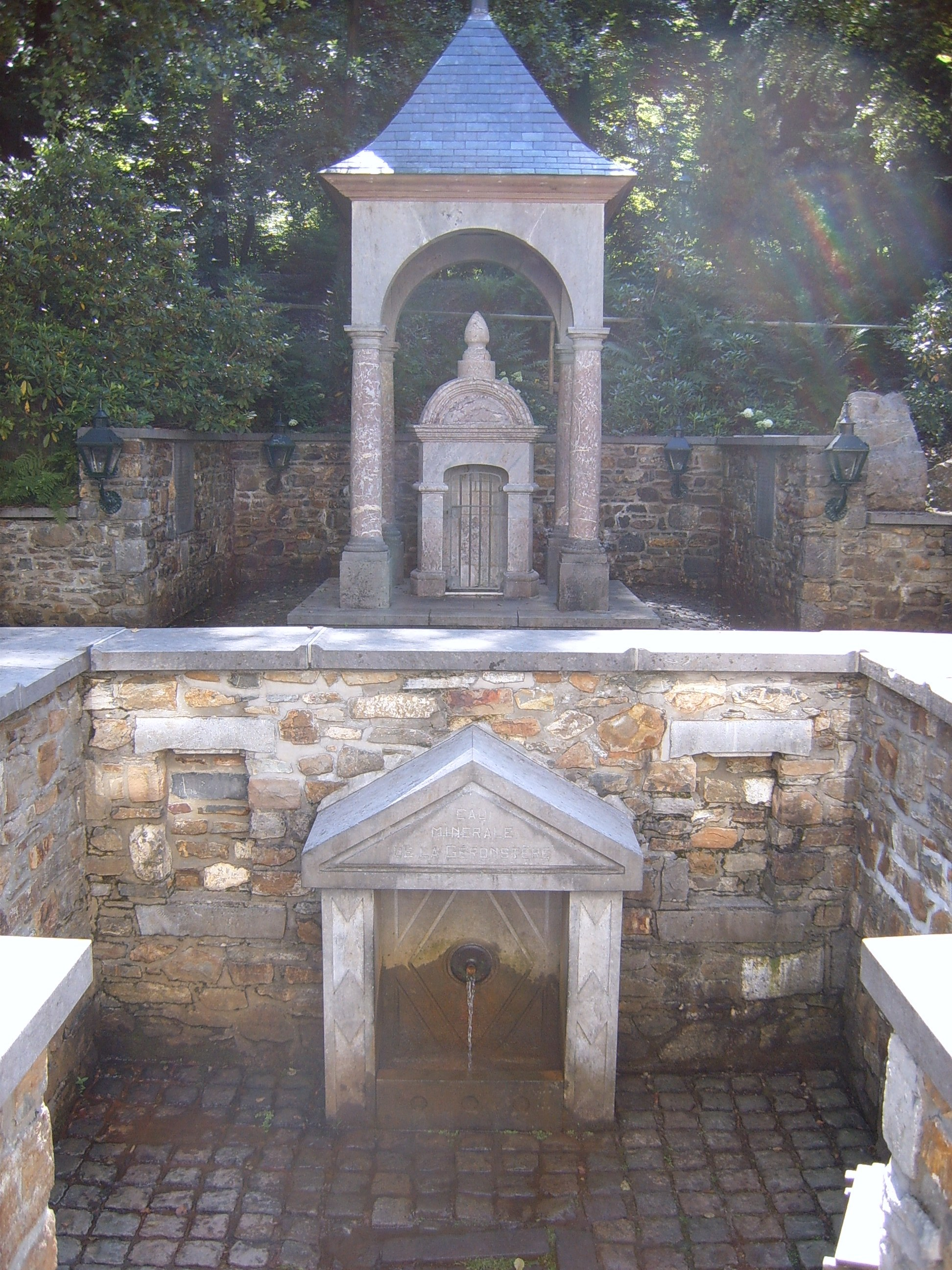 Source de la Géronstère, Spa personal picture, I set it in public domain.